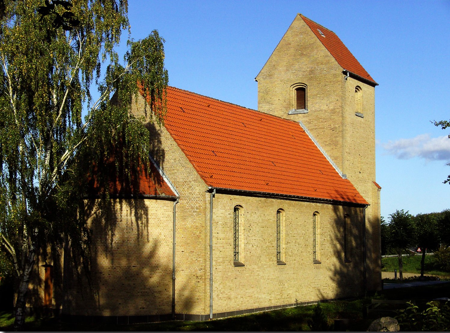 fra sydvest